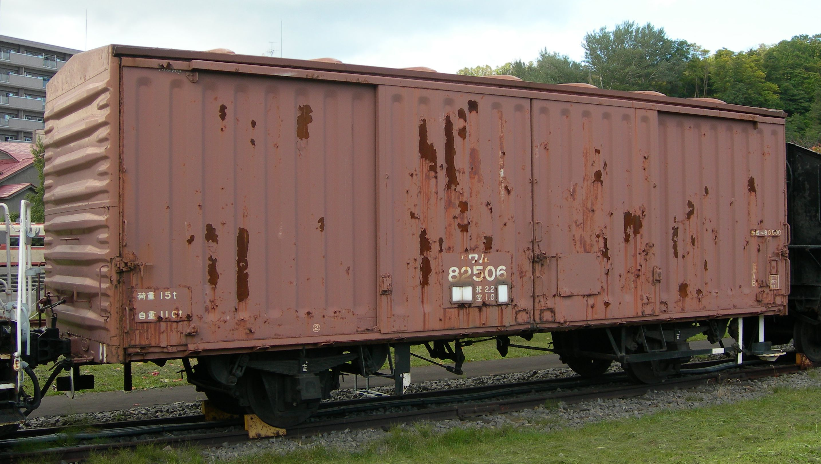 国鉄ワム80000形貨車 ワム82506（1次量産車）